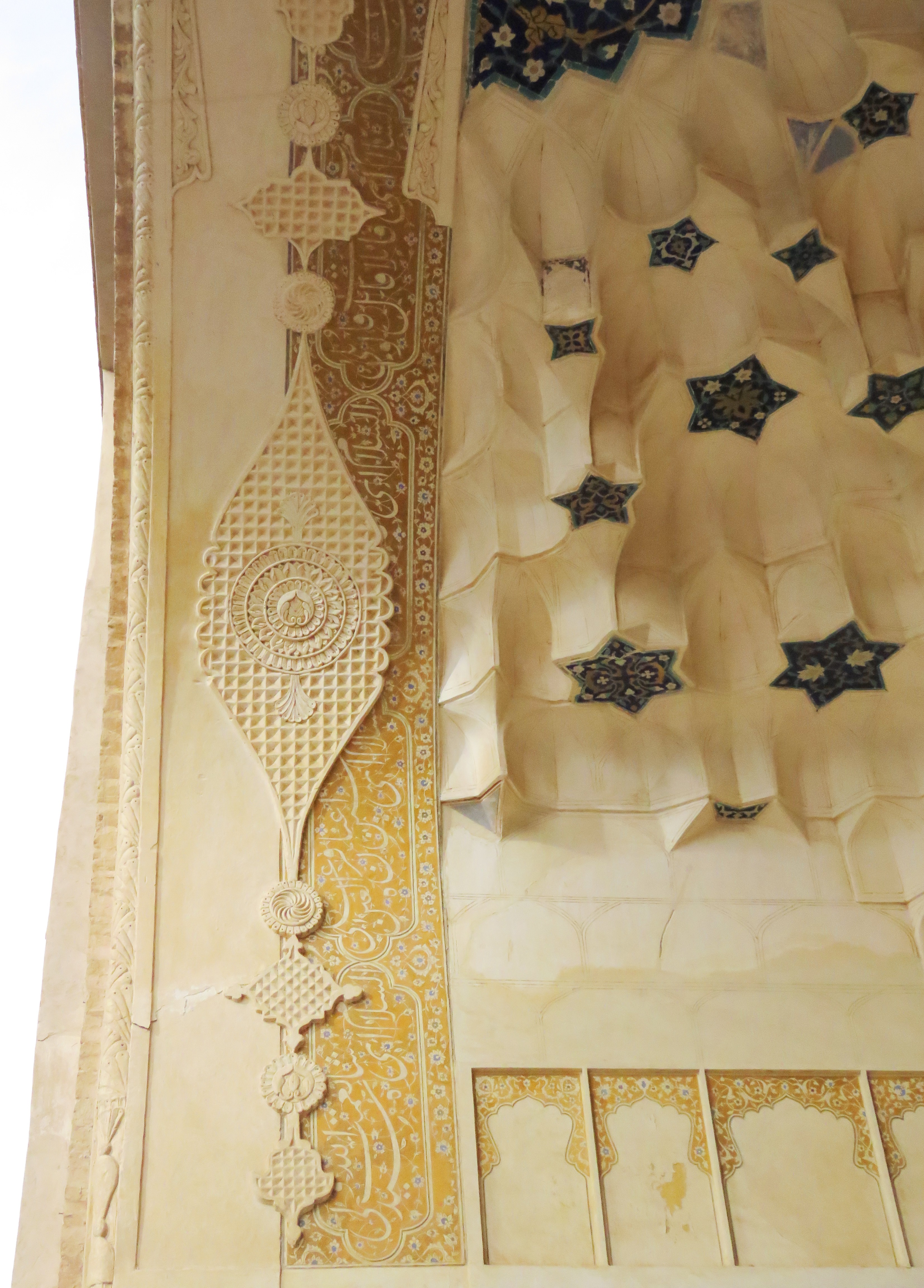 مقبره شاه نعمت الله ولی